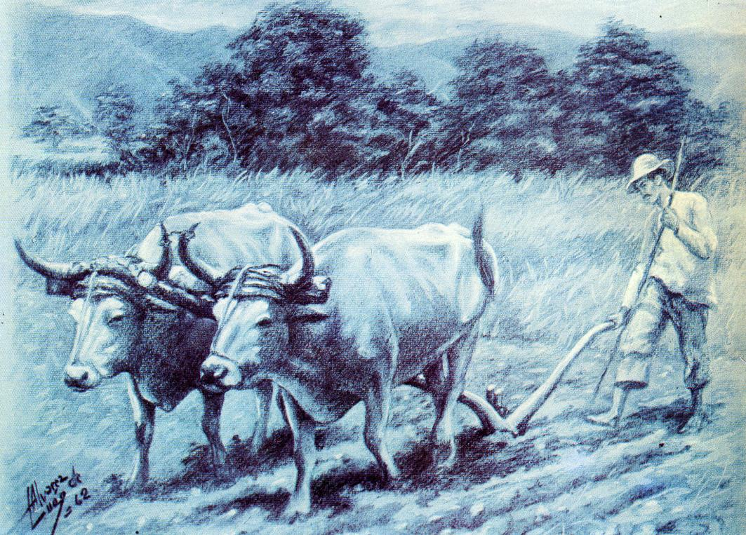 Dibujo del artista Luis Alvarez de Lugo "El Arado" 1962